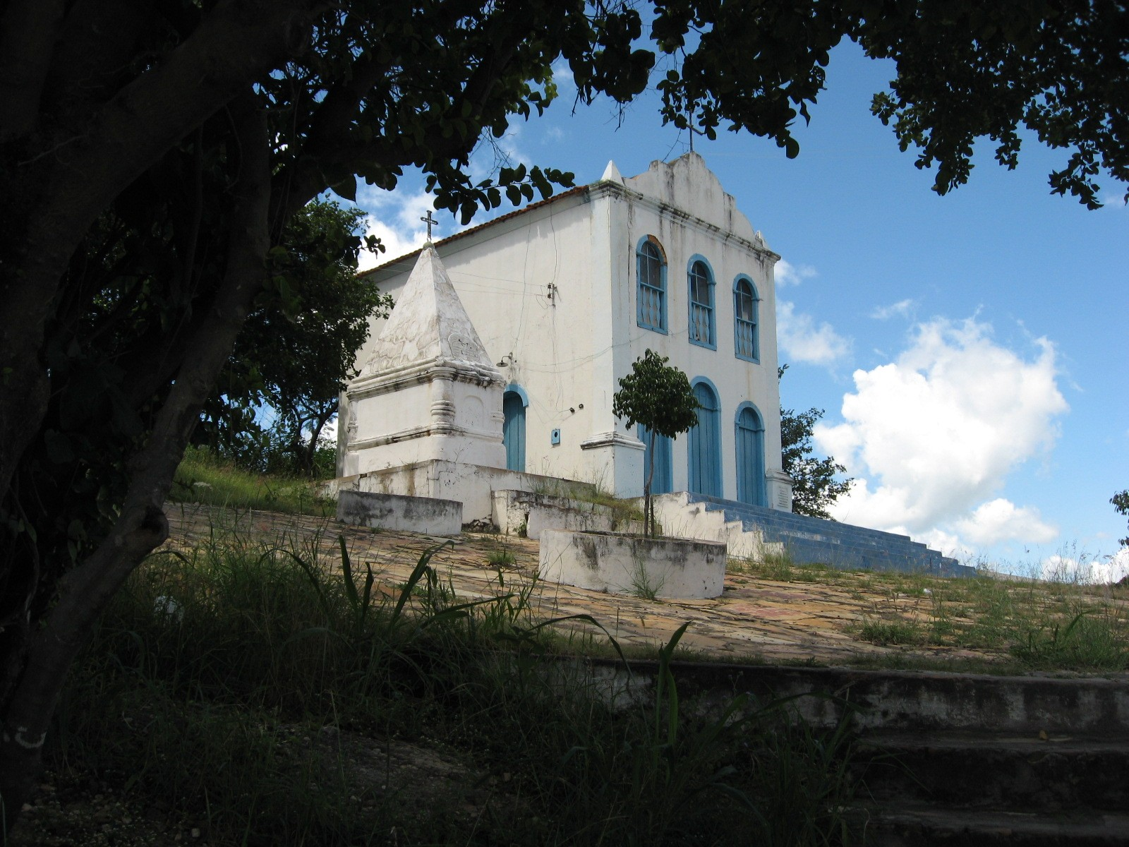 Vista da cidade baiana de Macaúbas.